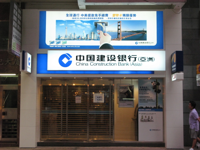 中文（香港）: 中國建設銀行（亞洲）在尖沙咀金馬倫道的分行。